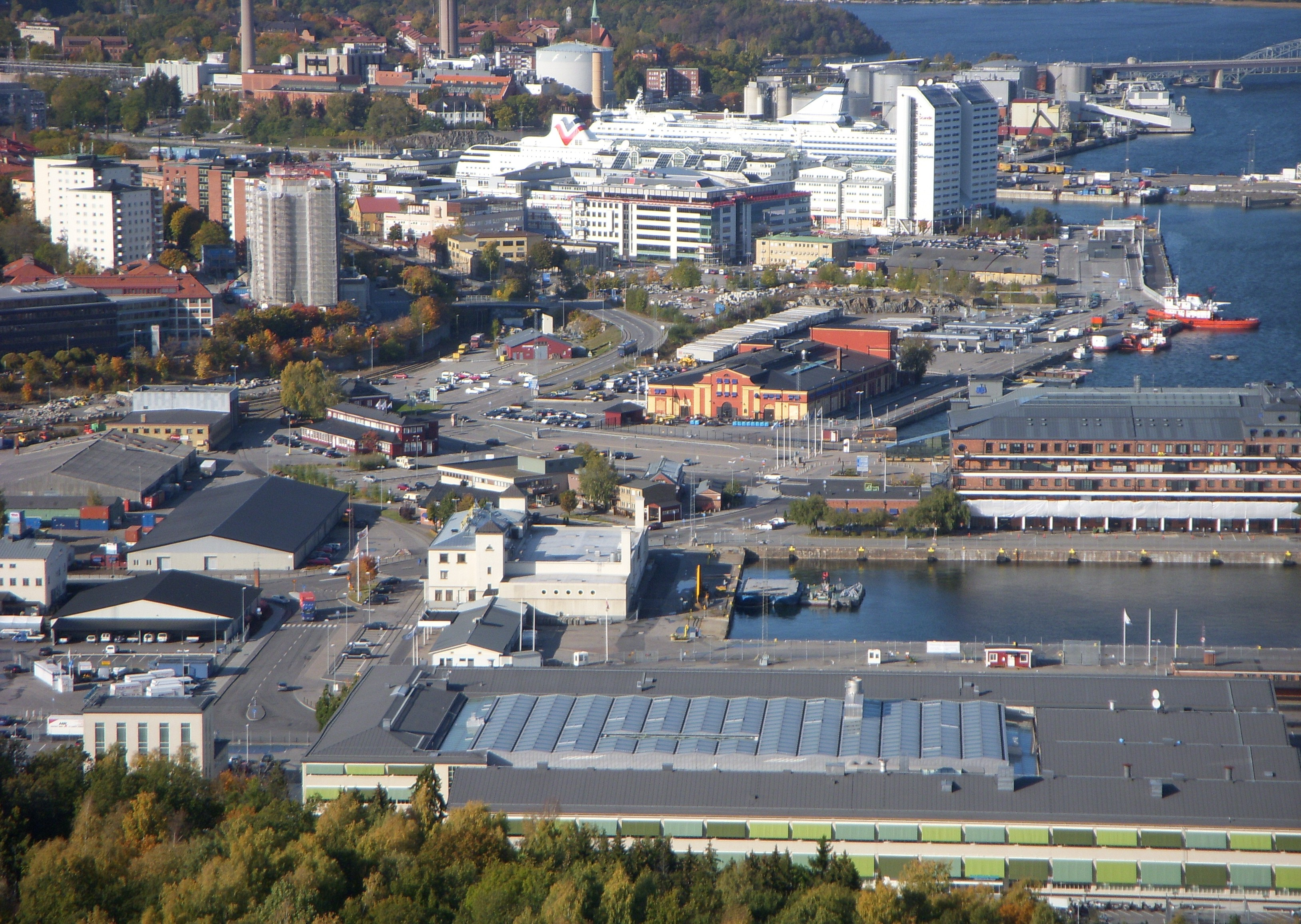 Stockholms frihamn med Värtahamnen i bakgrunden, vy från Kaknästornet oktober 2009